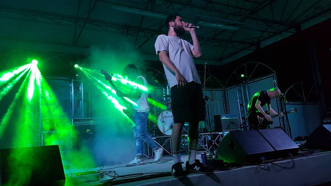 Voina, Botanici. Lion Valley Fest